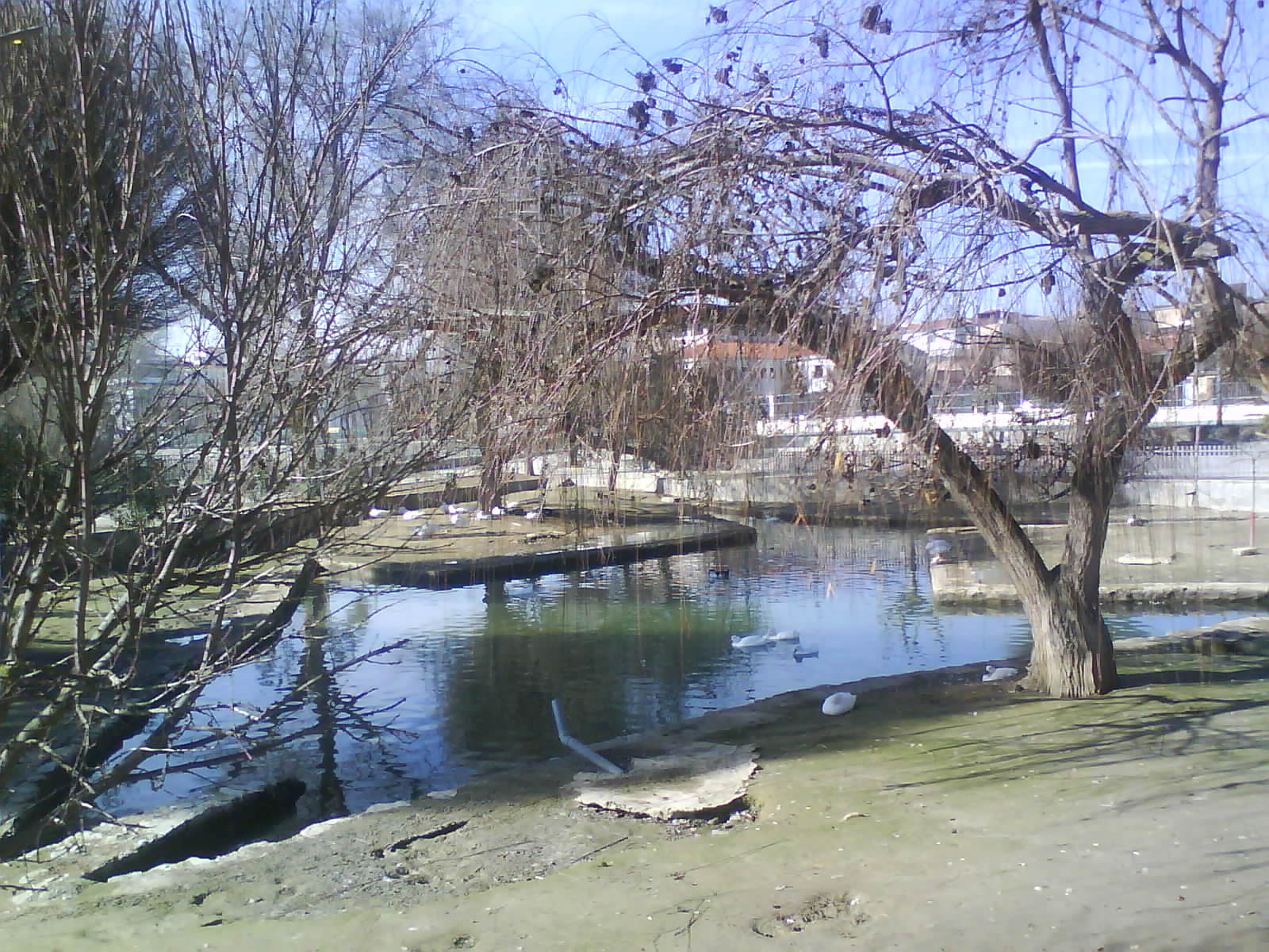 Vista del Parque de los Patos, en Huétor-Tájar (Granada, España)